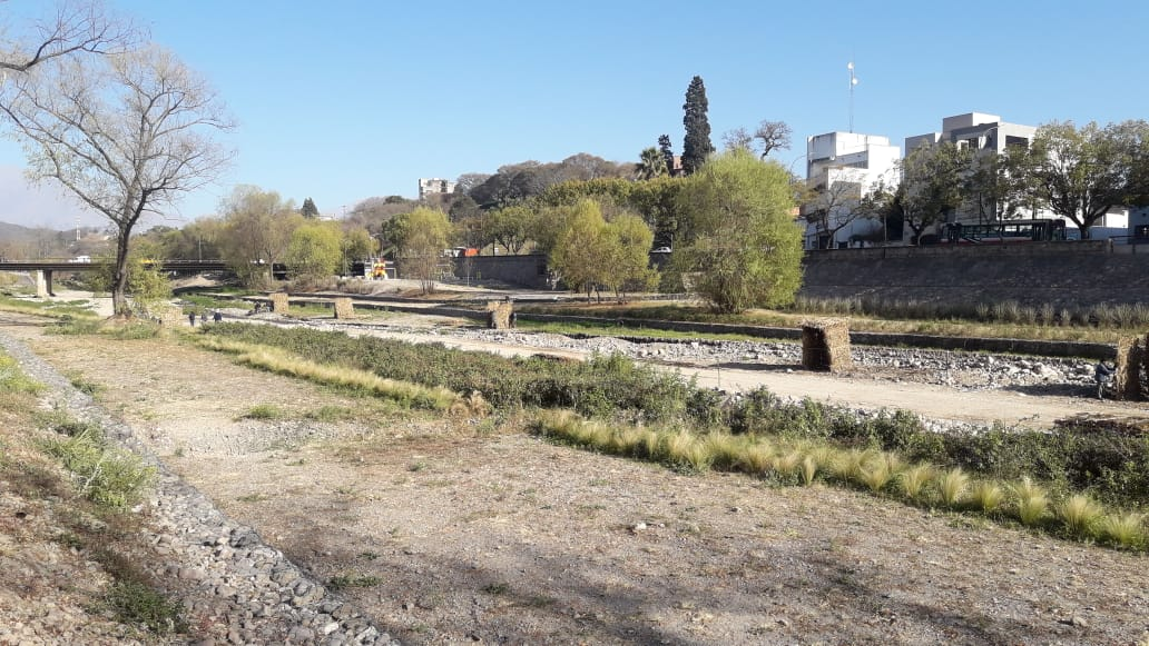 cada 23 de agosto es una fecha muy recordada por el pueblo jujuy la cual nos identifica en la historia argentina